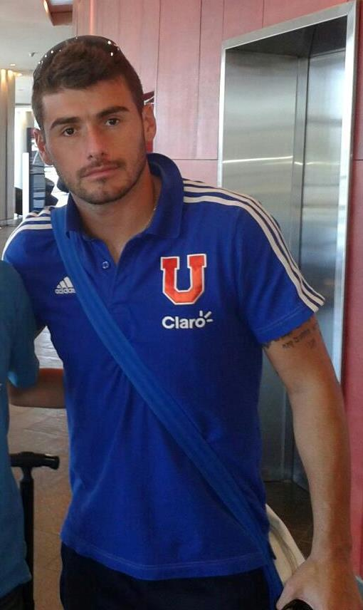 Portero Club Universidad de Chile